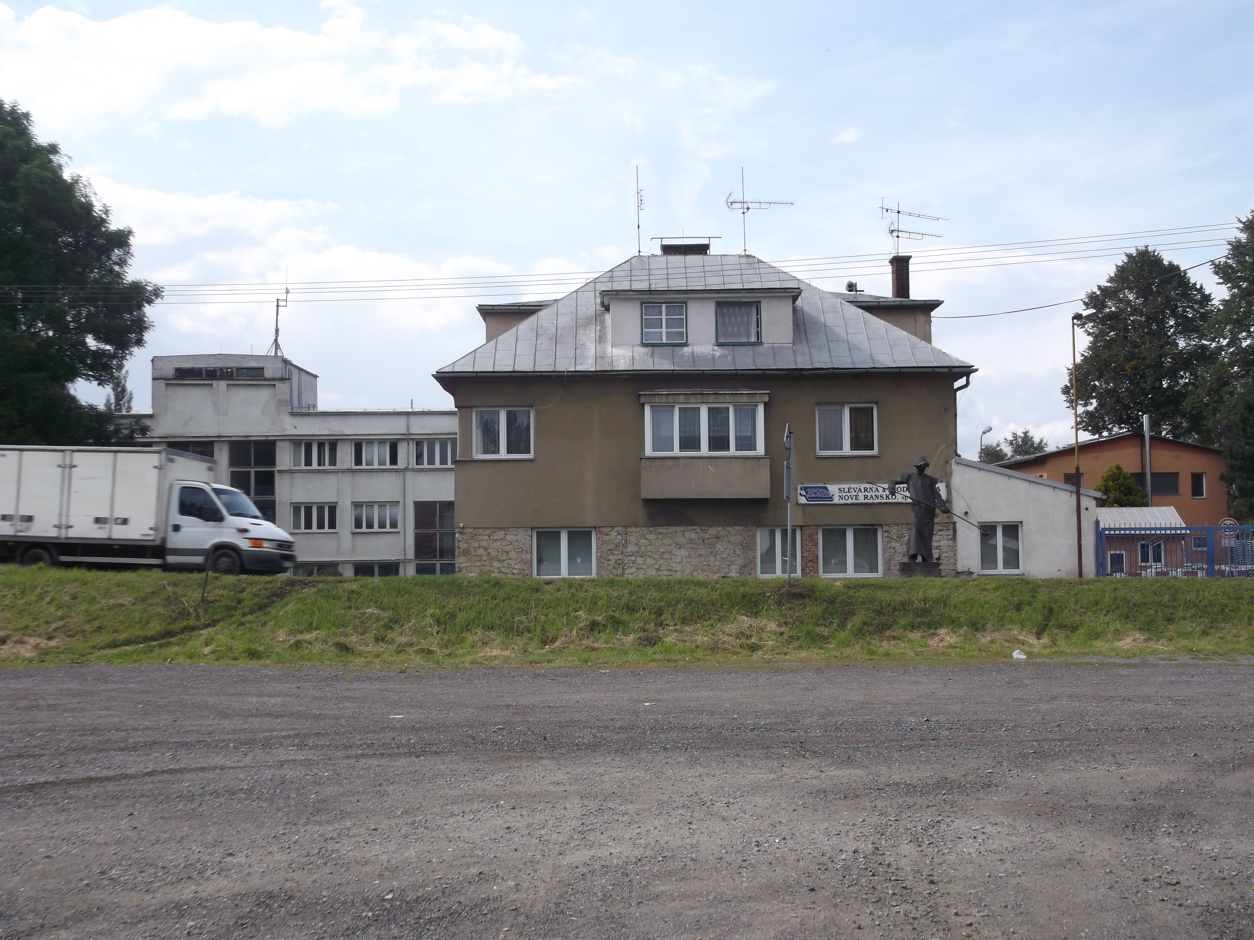 Nové Ransko - slévárna